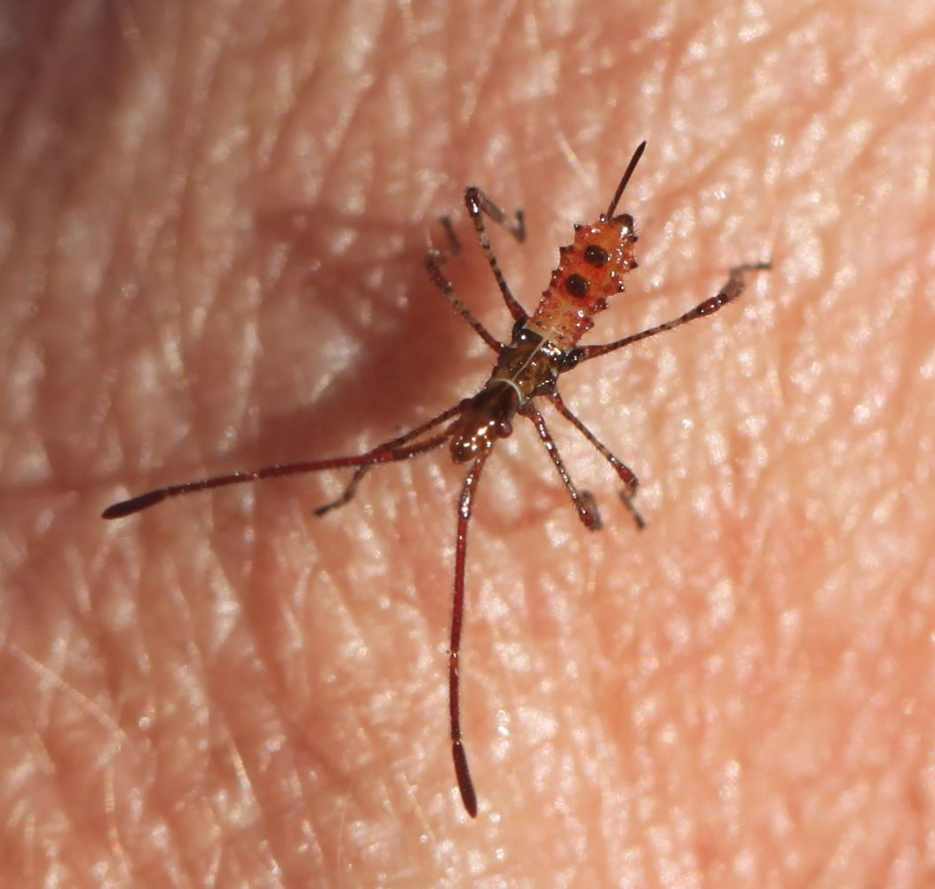 Zweites Nymphenstadium der Amerikanischen Kiefernwanze (Leptoglossus occidentalis) , am 1. Juli 2019 an der Côte d’Azur